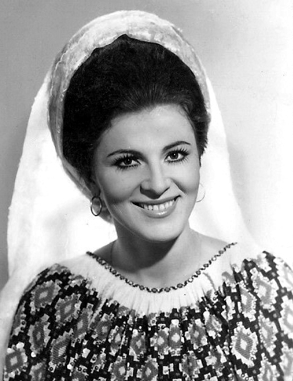 prelucrare Radu Cimpoi